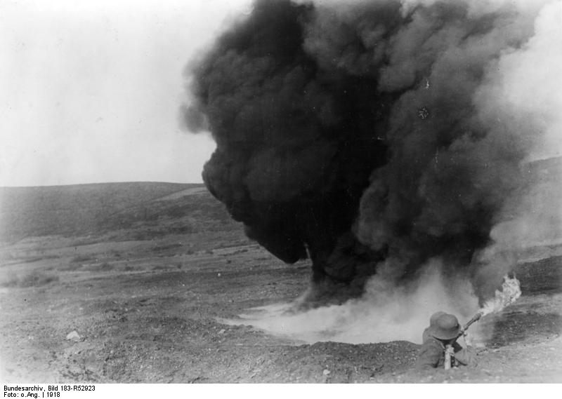 Westfront, Flammenwerferangriff Scherl: 1918. Von der großen Schlacht im Westen. Ein Flammenwerfer-Angriff aus dem ersten Schützengraben. 3295-18 ADN-ZB/Archiv I. Weltkrieg 1914-18 Westeuropäischer Kreigsschauplatz 1918. Flammenwerferangriff aus dem ersten Schützengraben während der großen Schlacht von Frankreich. 3295-18